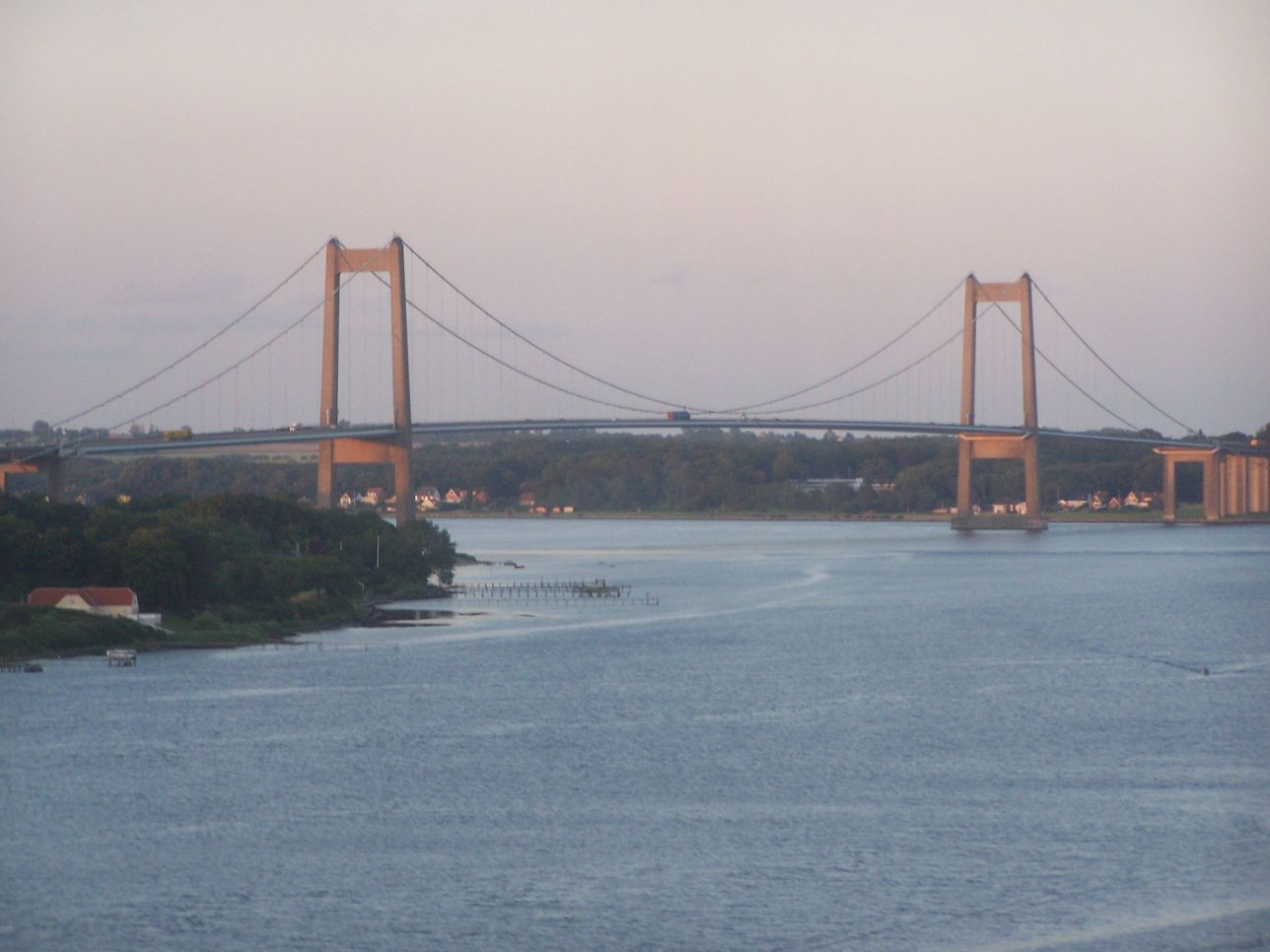 (c) 2006, Niels Elgaard Larsen Lillebæltsbroen connecting Funen, right and Jutland, left.